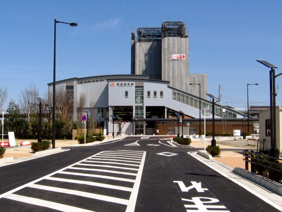 JR東海道線、野田新町駅南口